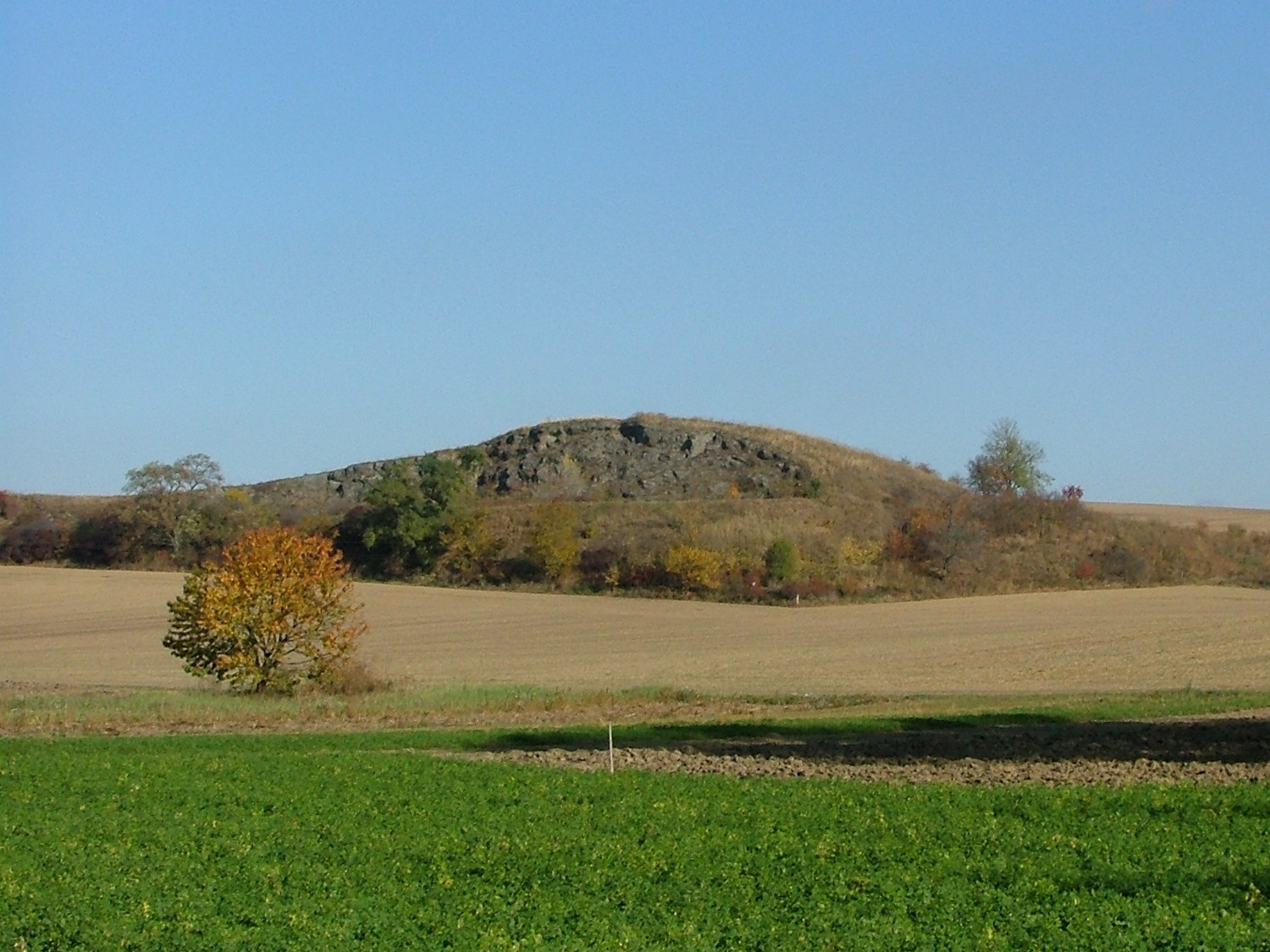 Přírodní památka Horka u Bedřichovic Autor: Tomáš Gregorovič Datum vzniku: 5. 05. 2006